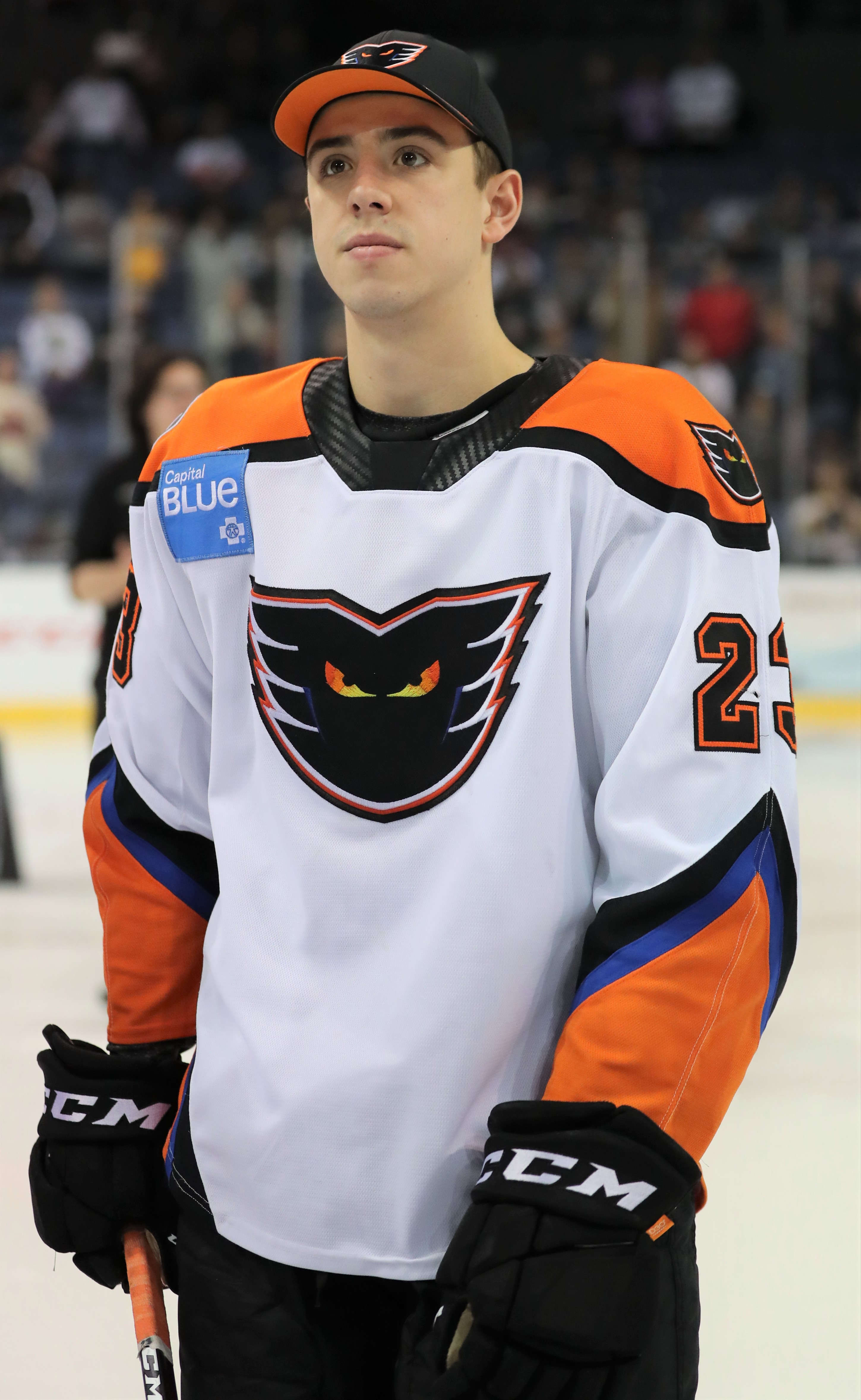 AA3I0751